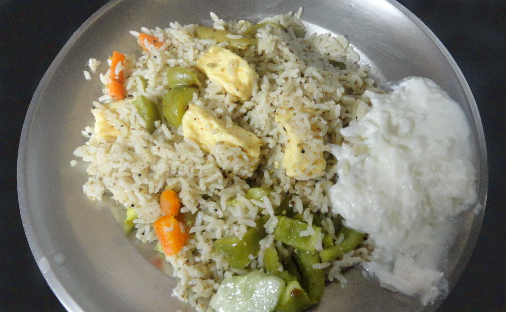 ಕನ್ನಡ: ದೊಣ ಮೆಣಸಿನಕಾಯಿ ಪನೀರ್ ಒಗ್ಗರಣೆ ಬೆರೆತ ಪಲಾವ್ ಮತ್ತು ಮೊಸರು ಬಜ್ಜಿ